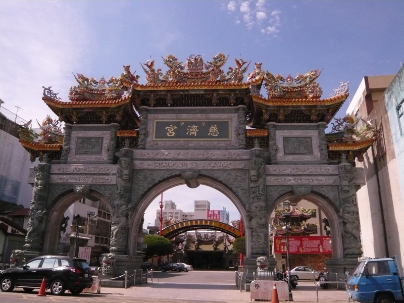 學甲慈濟宮山門Bân-lâm-gú: Ha̍k-kah Tsû-tsè-kiong suann-mn̂g. 學甲慈濟宮山門